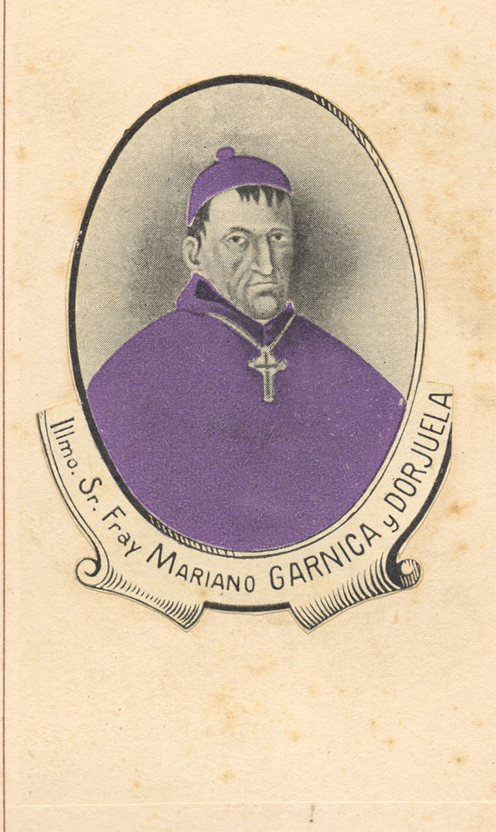 Fray Mariano Garnica y Orjuela (* Chiquinquirá, Boyacá, 1770 - † Medellín, Antioquia, 16 de agosto de 1832), fue un clérigo colombiano de la Iglesia Católica, primer obispo de la Diócesis de Antioquia.